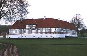 Åkær er en herregård, der kendes tilbage til begyndelsen af 1300-tallet. Den blev 1548 hovedsæde i et len der omfattede Hads Herred, og i 1660 blev det omdannet til Åkær Amt.